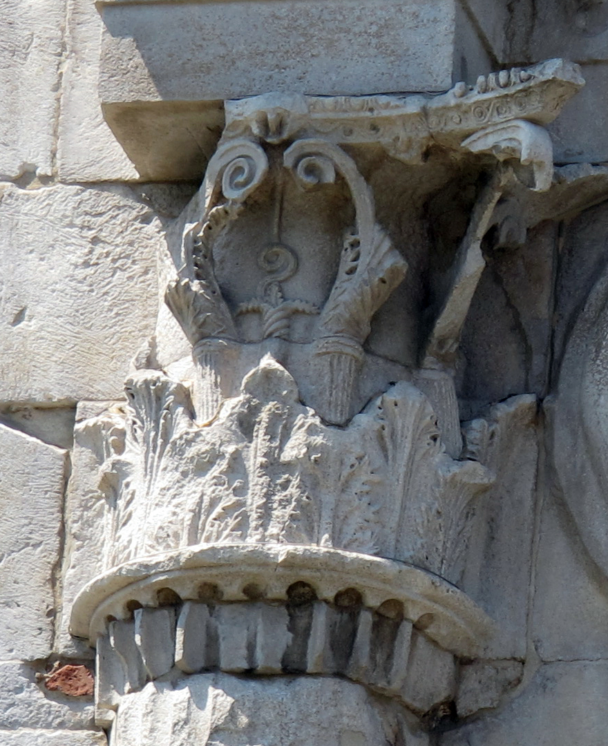 Arco di Augusto - MIBAC This is a photo of a monument which is part of cultural heritage of Italy.